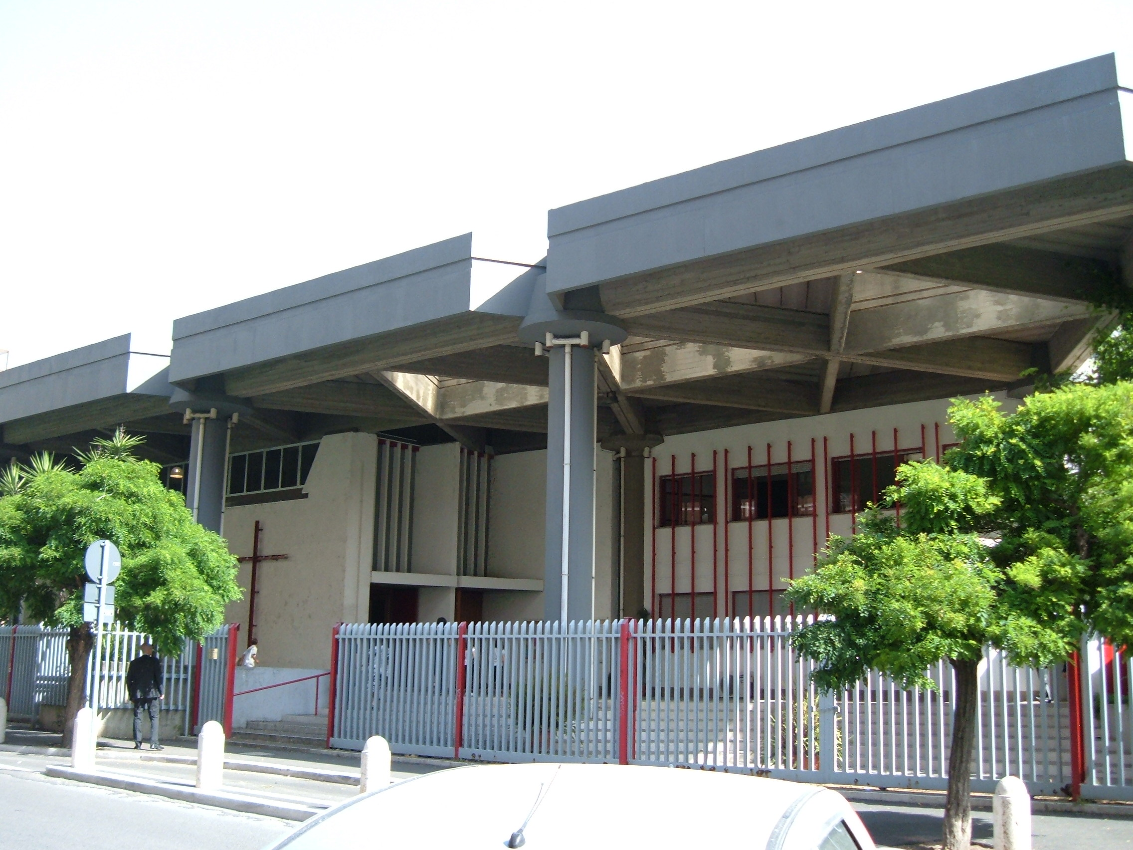 Chiesa della Santissima Trinità, a Roma, nel quartiere Trieste.